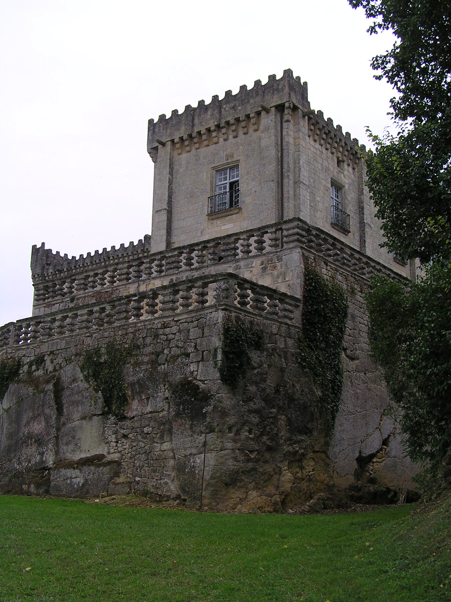 château de Fleurac à Nersac